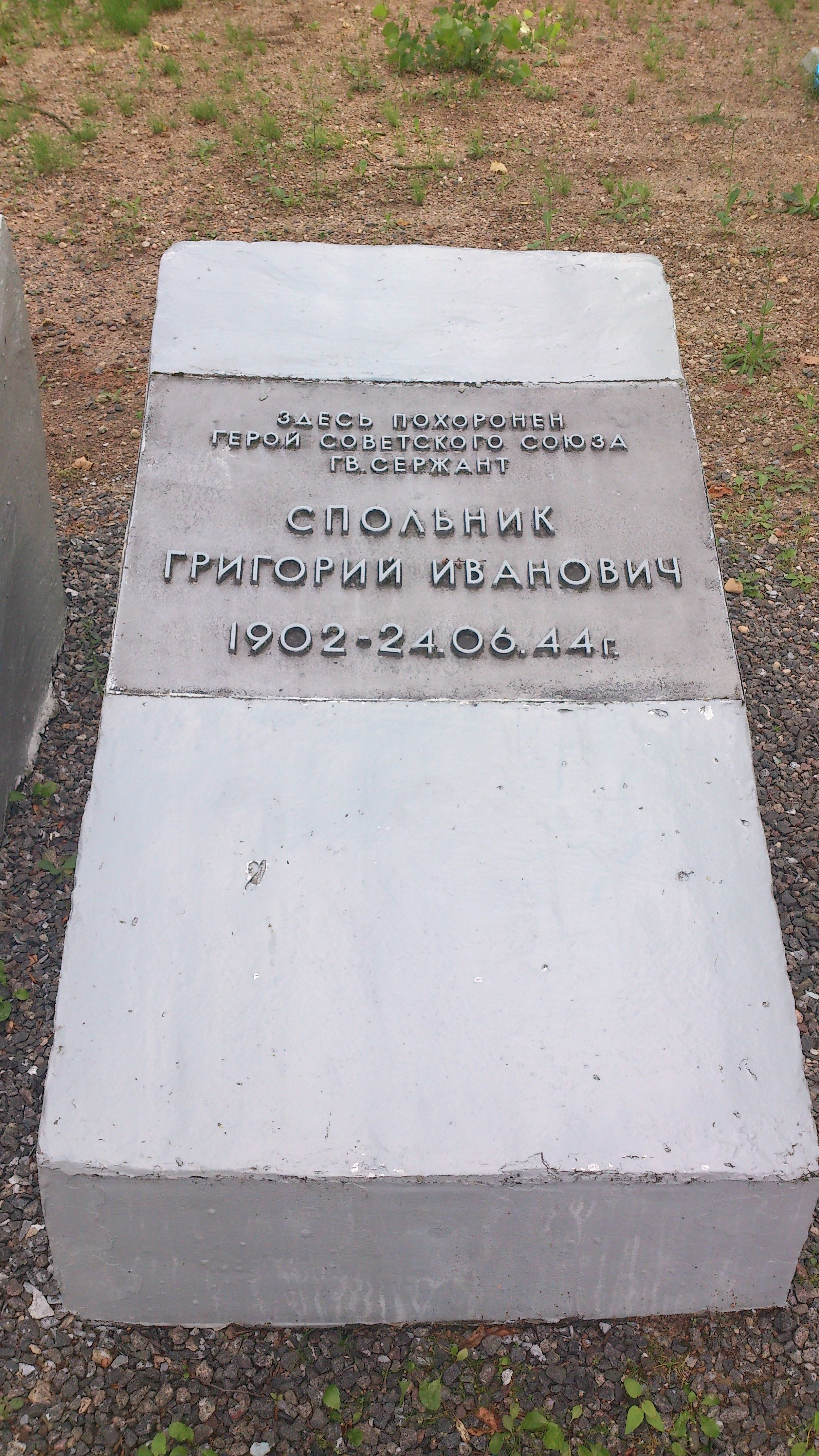 Надмогильная плита Герою Советского Союза Спольнику Г.И. на братской могиле в Бешенковичах